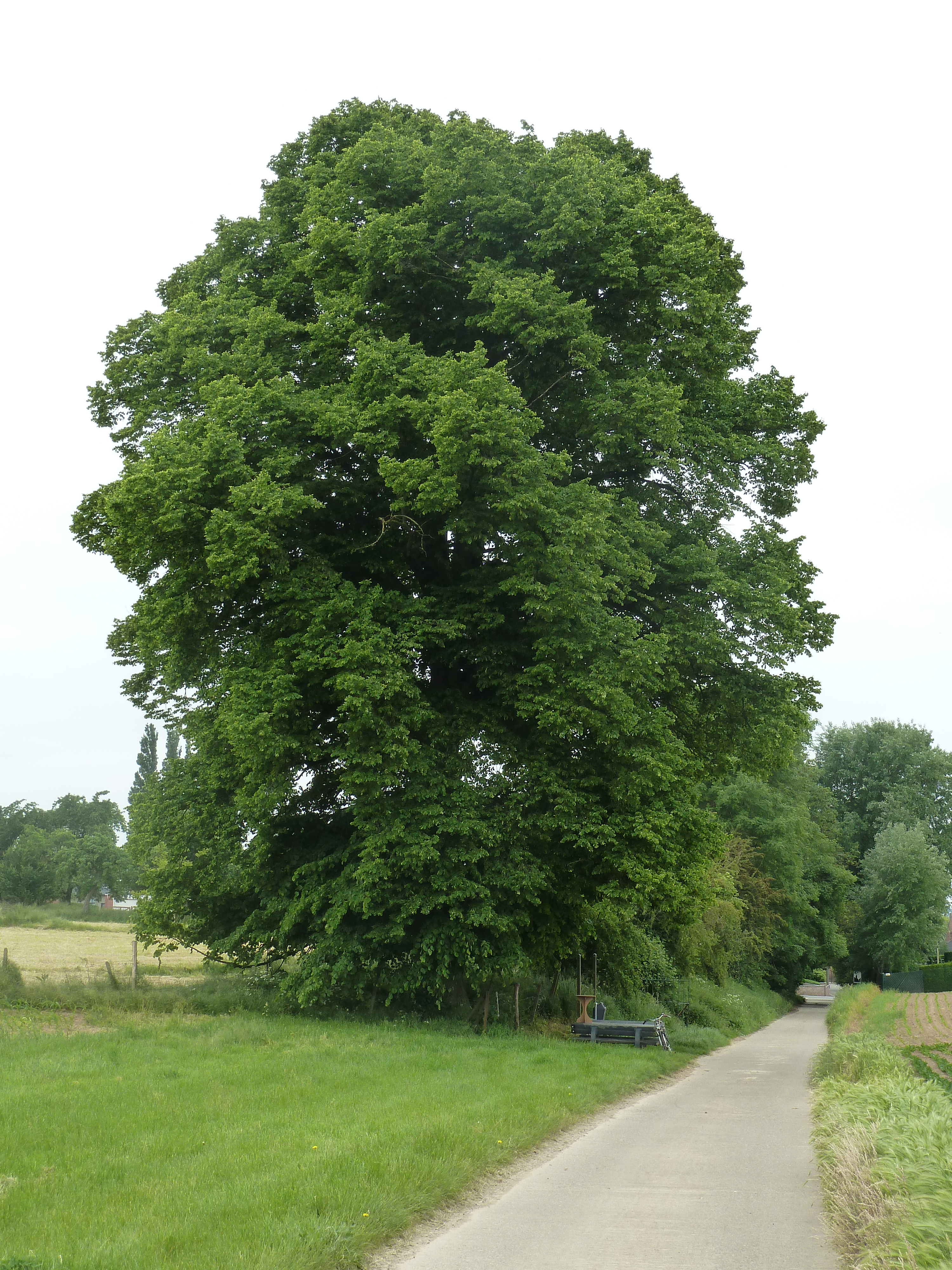 Kwartjesboom, Val-Meer, Riemst, België